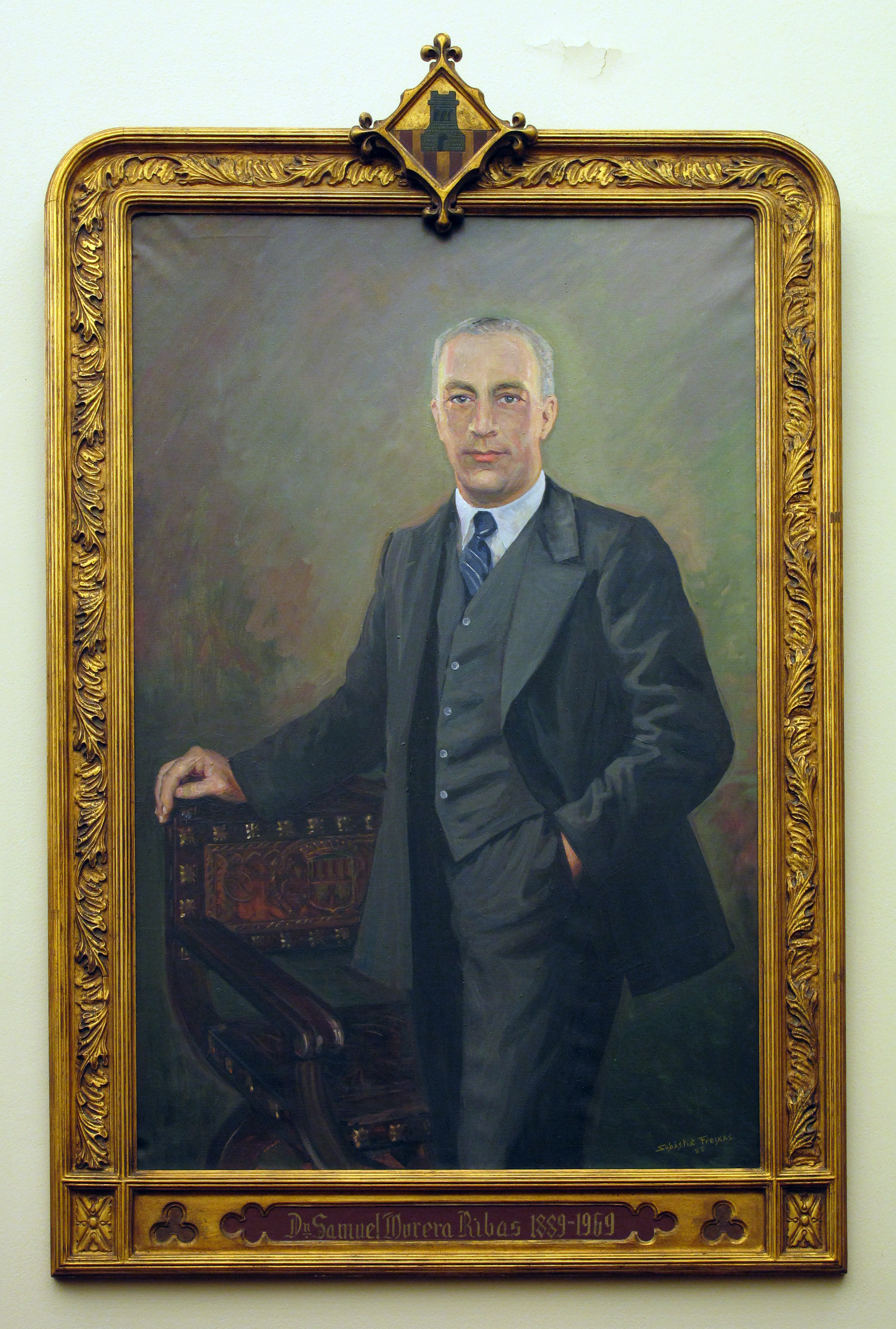 Ajuntament de Terrassa)